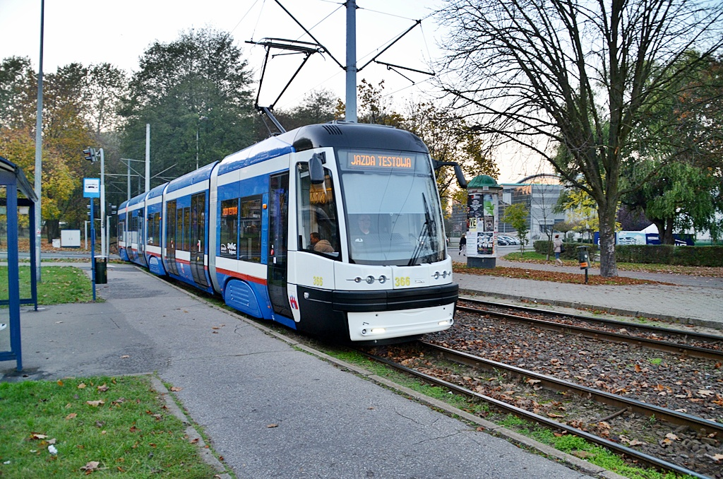 Tramwaj Pesa Swing dla Bydgoszczy